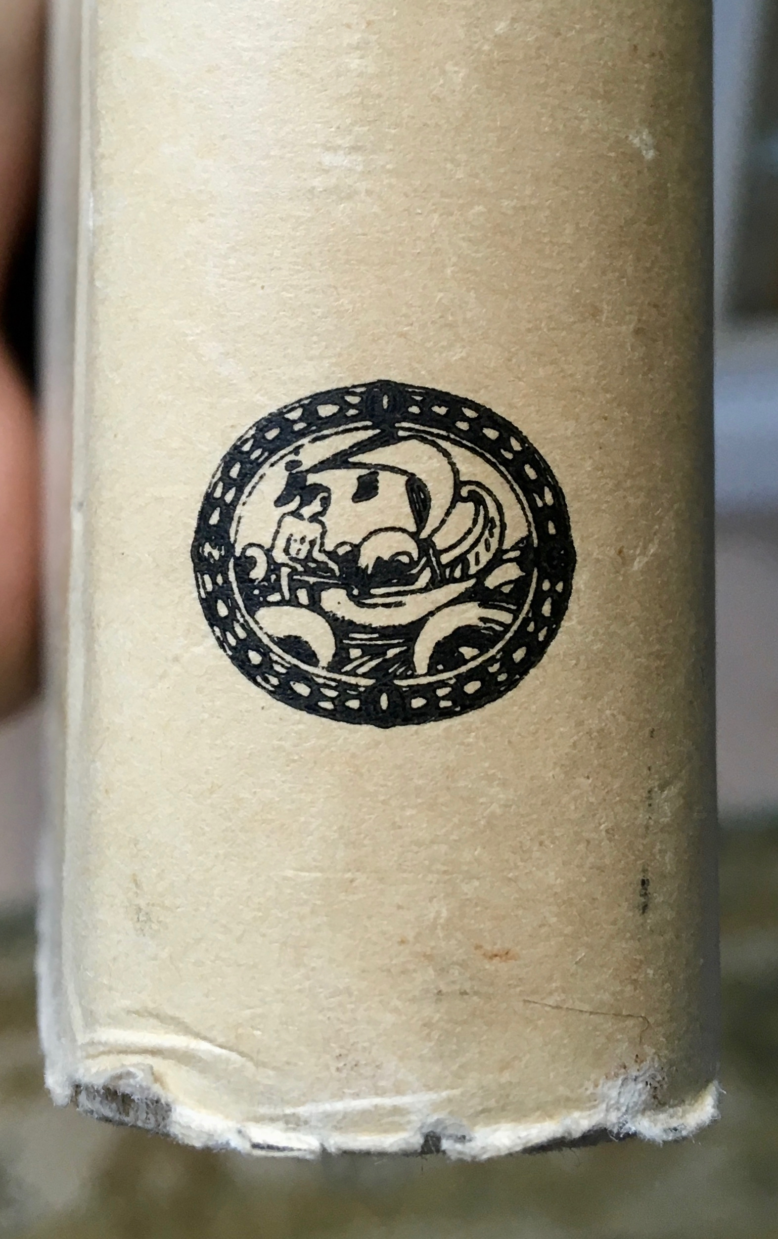 Noor-Eesti embleem seljal